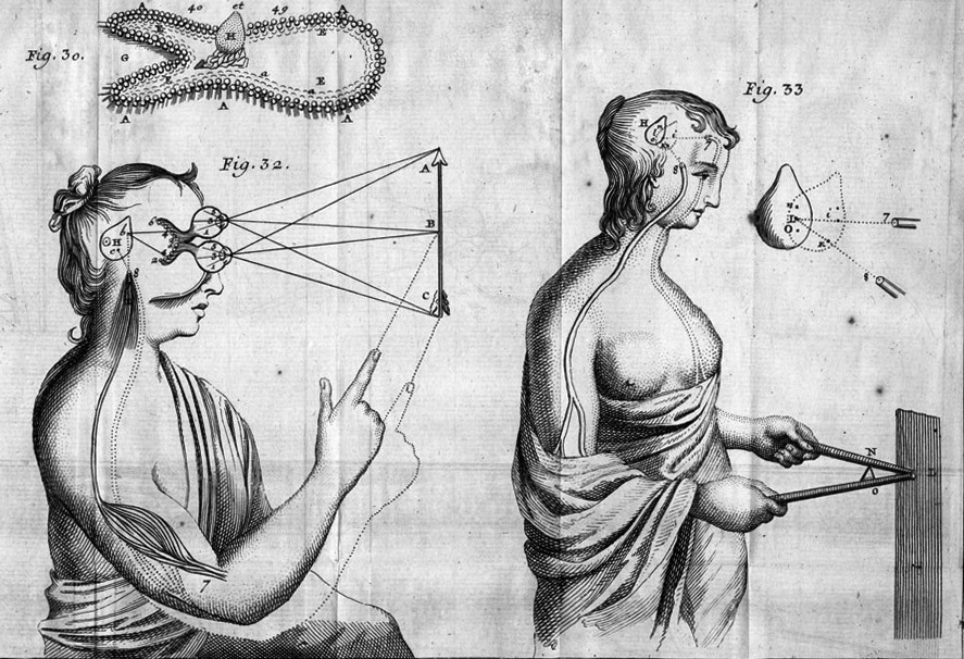 René Descartes (1596-1650): L’homme de René Descartes, et la formation du foetus…. Paris: Compagnie des Libraires, 1729.